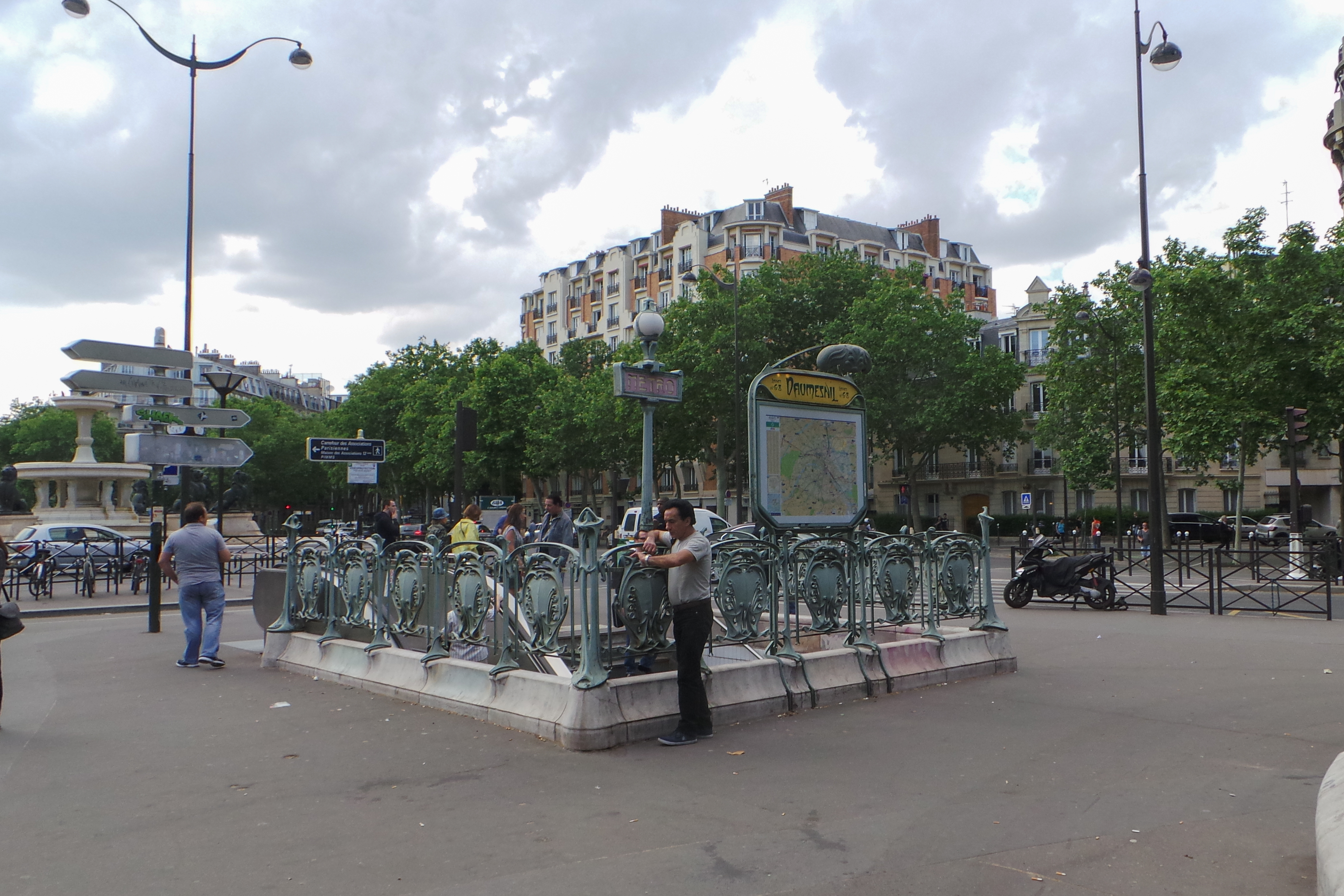 Station de métro Daumesnil, lignes 6 et 8 du métro de Paris - Paris, France